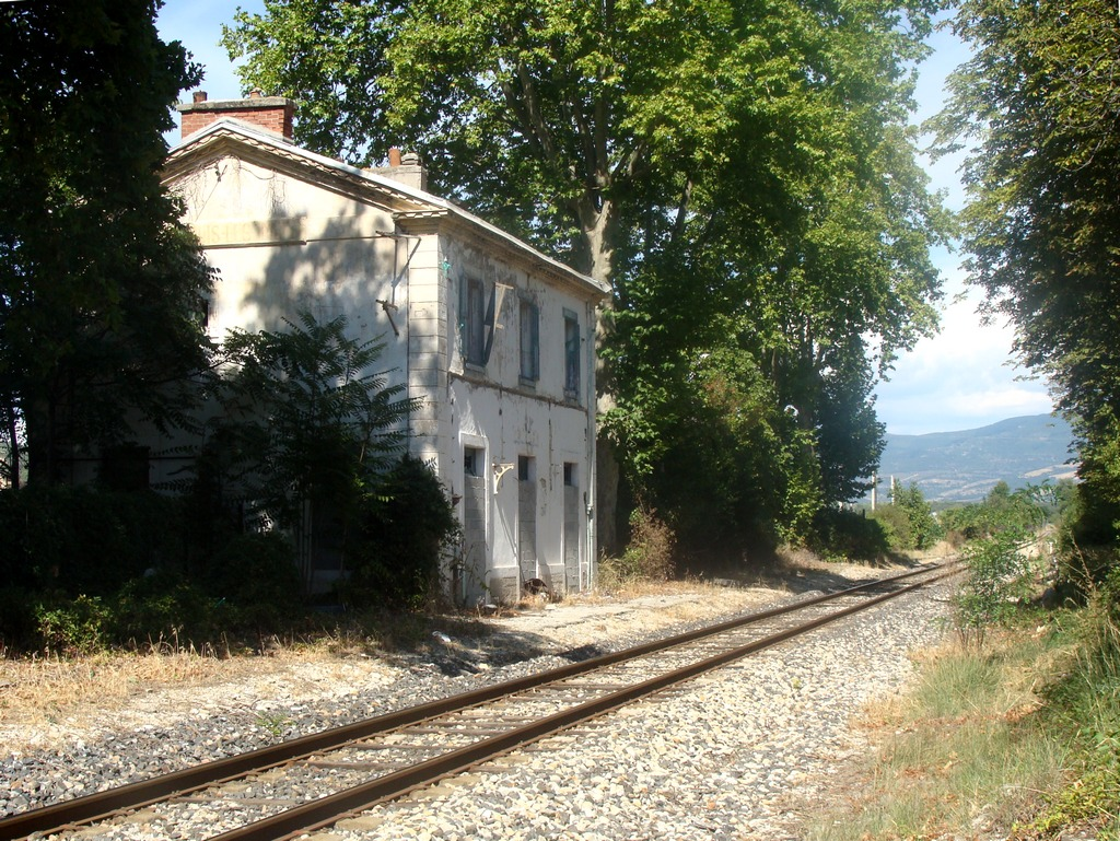 L'ancienne gare de Peyruis - Les Mées, sur la ligne Marseille - Briançon, entre Manosque et Sisteron.